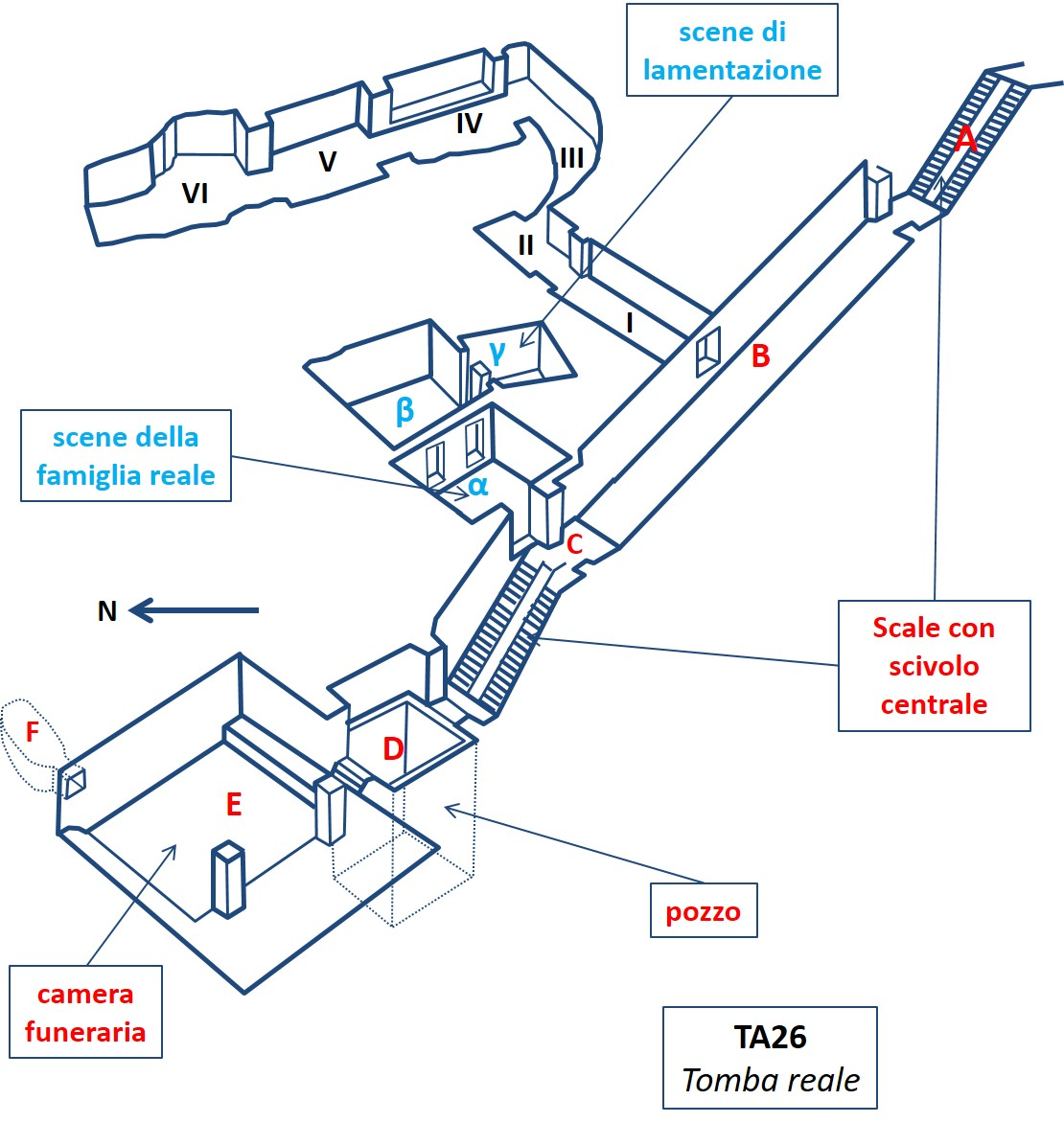 Assonometria schematica della Tomba Reale (TA26) di Amarna